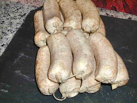 Frisch hergestellte, geräucherte Pinkelwürste als Saisonangebot am Fleischtresen